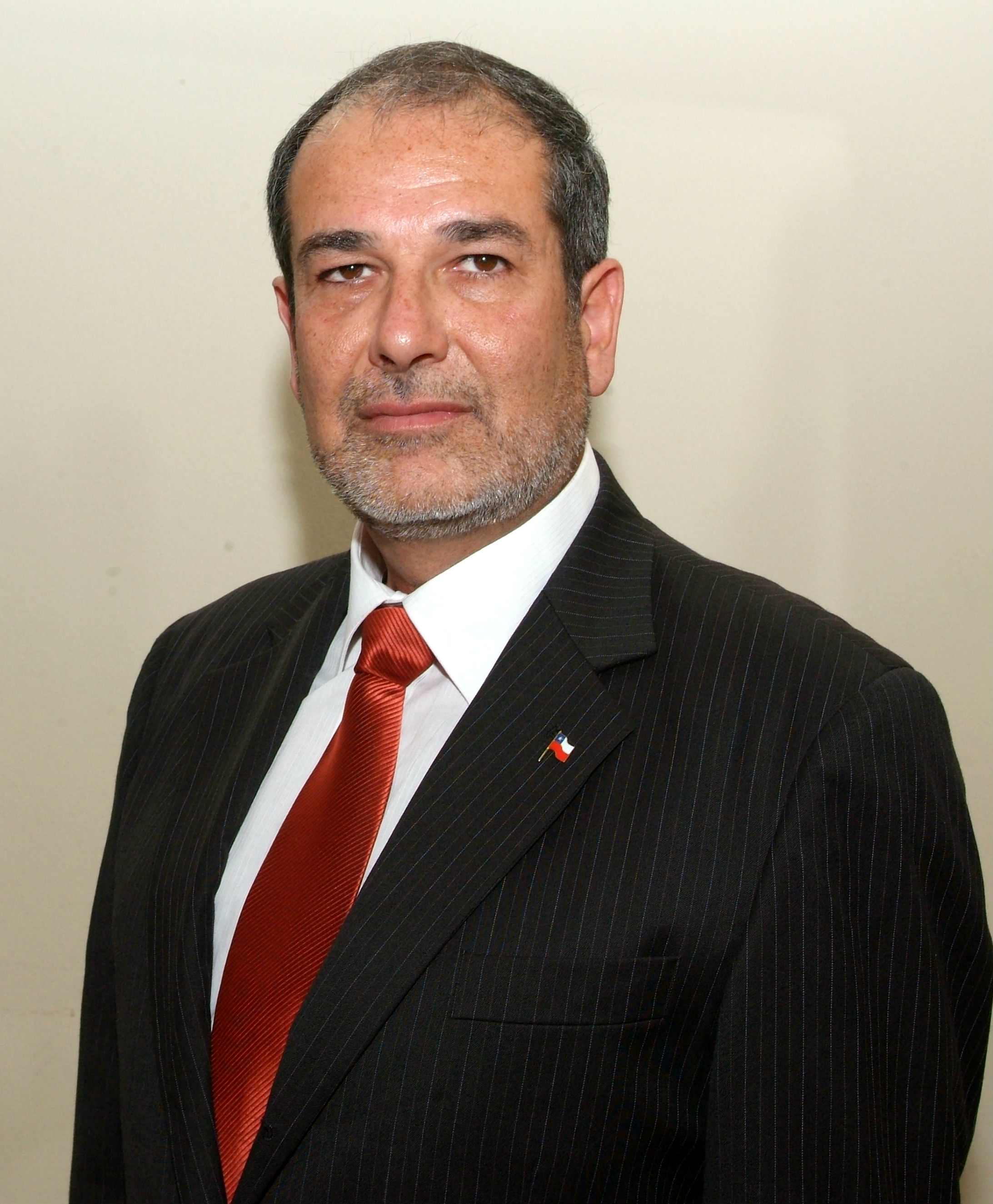 Retrato de Mario Burlé Delva, intendente de la Región de Coquimbo.